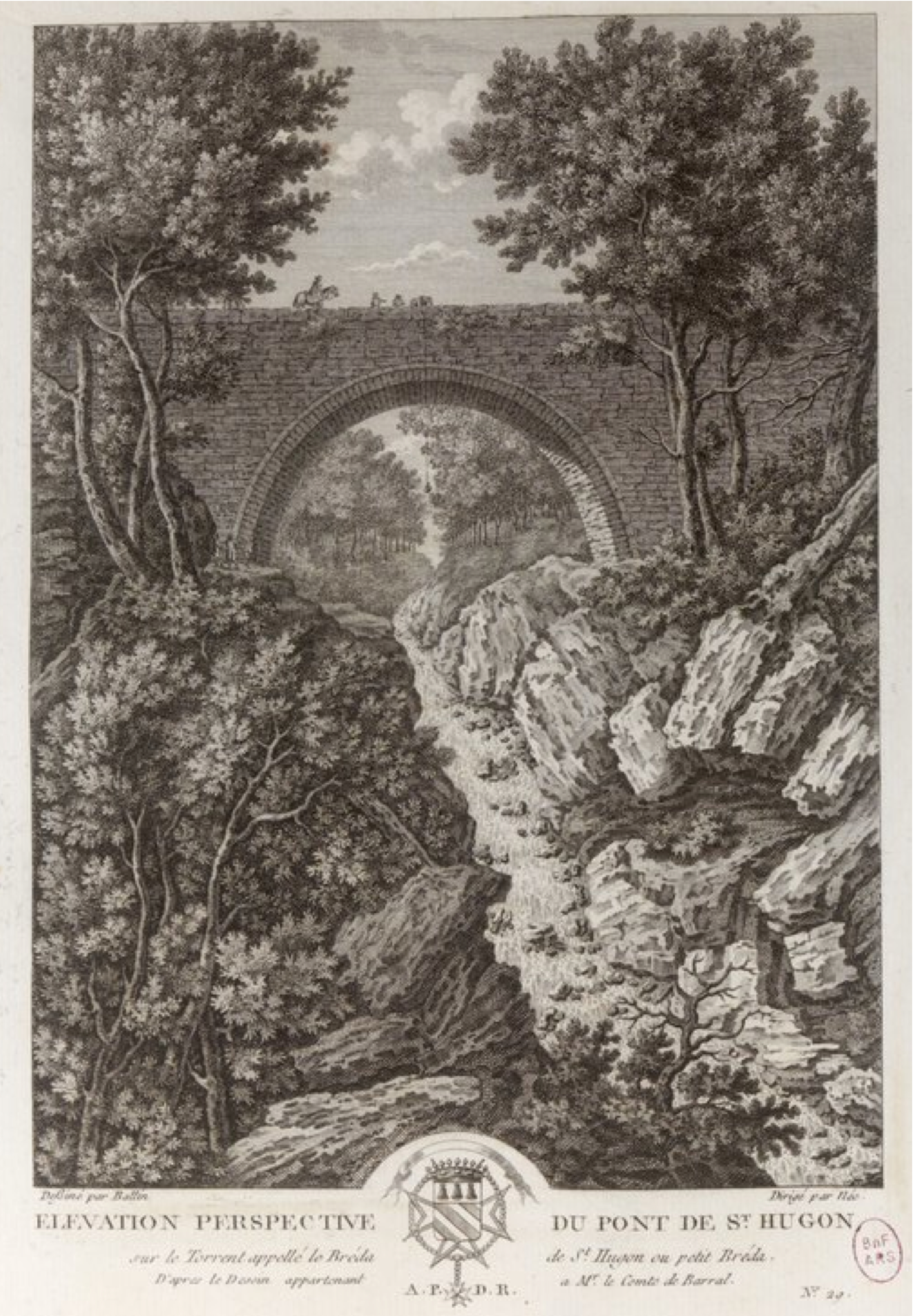 illustration du livre Voyage pittoresque de la France : avec la description de toutes ses provinces. Ouvrage national, dédié au Roi, orné d'un grand nombre de gravures exécutées avec le plus grand soin, d'après les dessins des meilleurs artistes. Dauphiné ; Ile-de-France, Paris, par Une Société de gens de lettres [par de La Borde, Béguillet, Guettard, etc.], Paris, Éditeur : imprimerie de Monsieur. Chez Lamy, libraire, quai des Augustins, n° 26. M. DCC. LXXXIV-M. DCC. LXXXXII, 1784-1792.